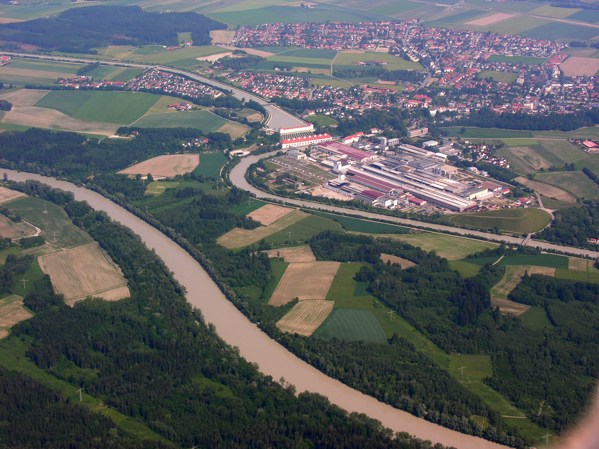 Germany, Bavaria, Töging am Inn Boarisch: A Luftbuidl vo Deging mitn Inn (untn) und am Inn-Kanoi (in da Mittn).